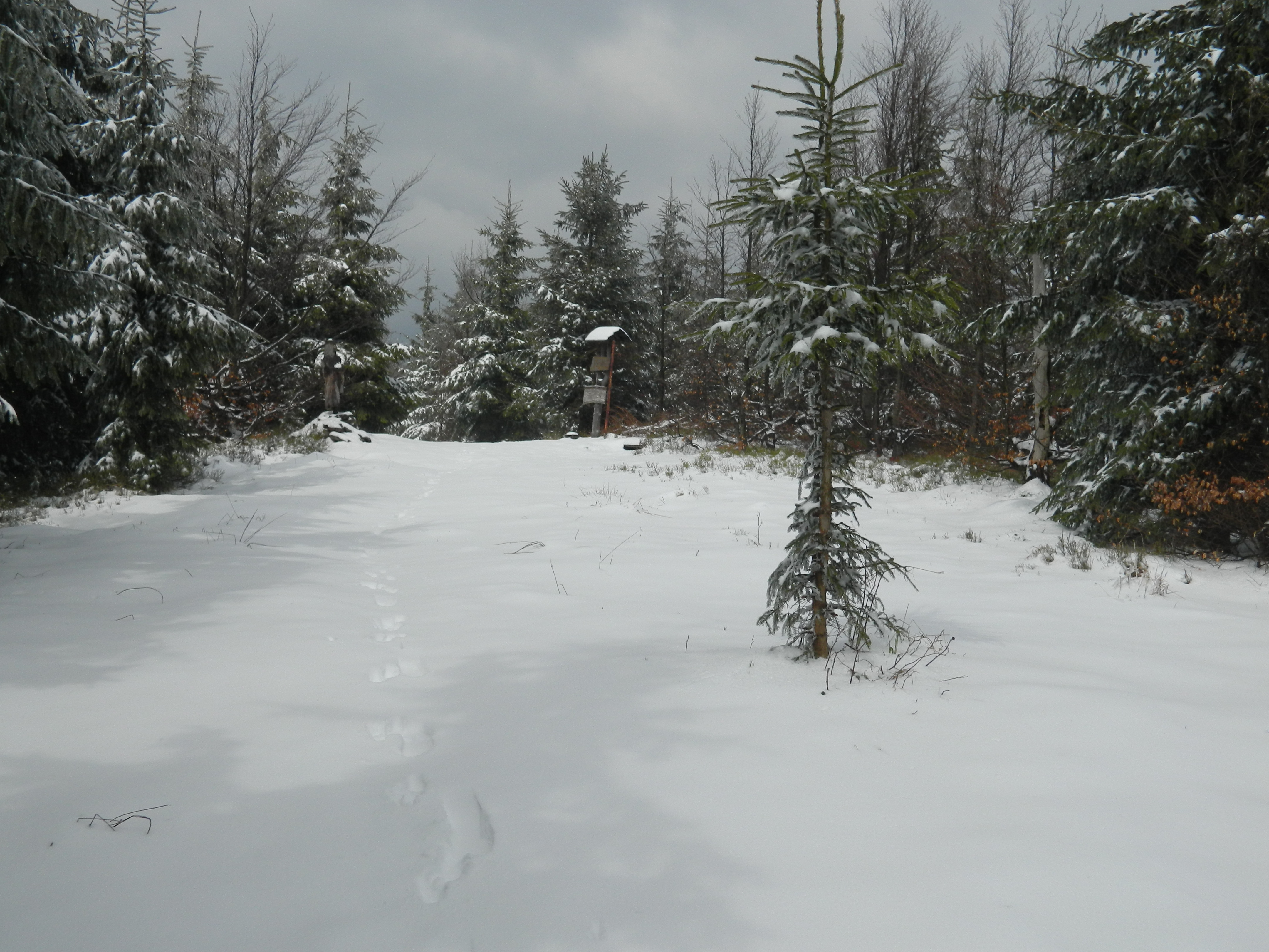 Pohled na vrchol hory Ropice